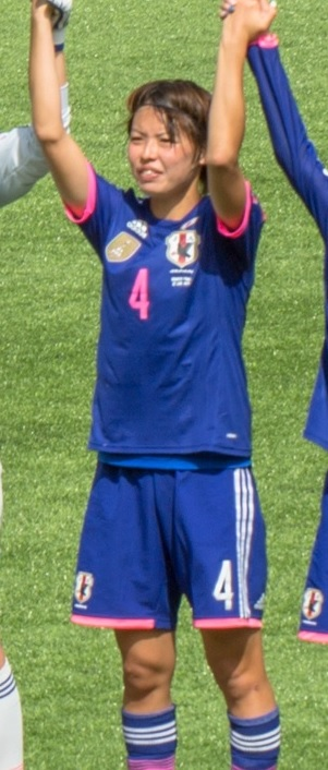 Saki Kumagai (熊谷紗希) le 27 juin 2015 lors du match contre l'Australie lors de la Coupe du monde 2015 au Canada.